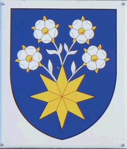 Znak Troubelic.